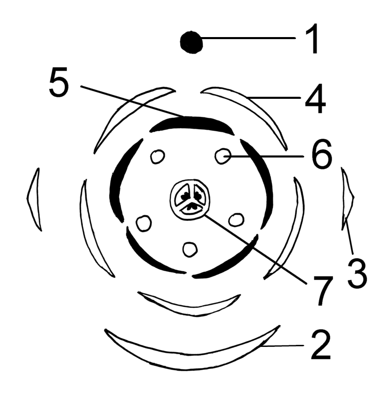 Example of a Flower diagram with parts numbered//Beispiel für Blütendiagramm: 1 Abstammungsachse, 2 Vorblatt (Braktee), 3 Vorblatt, 4 Kelchblatt, 5 Kronblatt, 6 Staubblatt, 7 Stempel